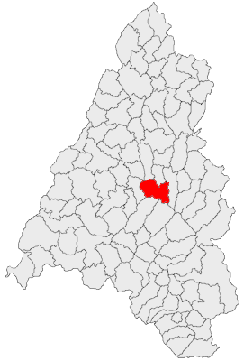 Categorie:Hărţi ale judeţului Bihor